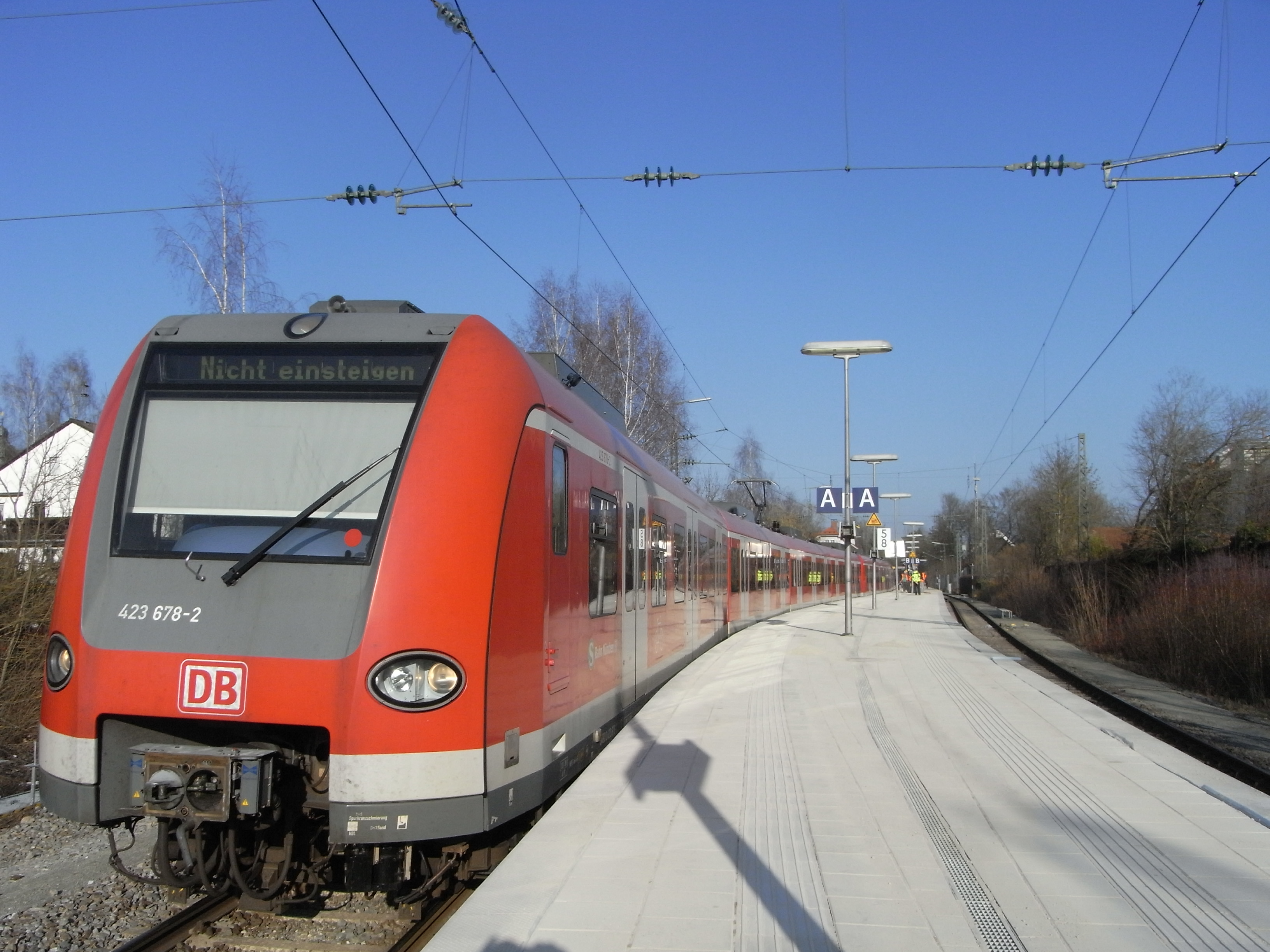 Ebersberg, Bahnhof, Blick von Westen den Bahnsteig entlang.